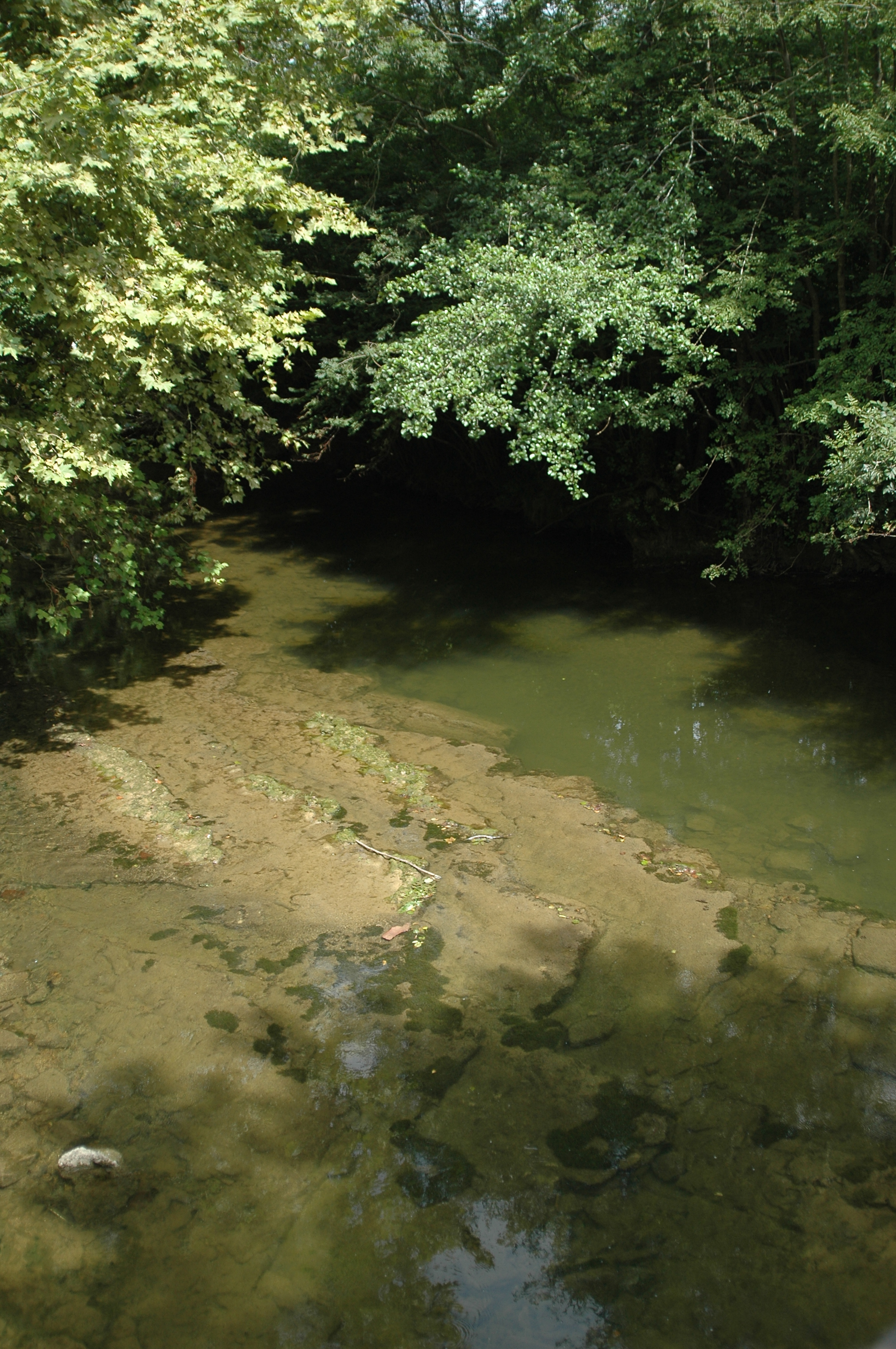 la Bidouze à Arhansus